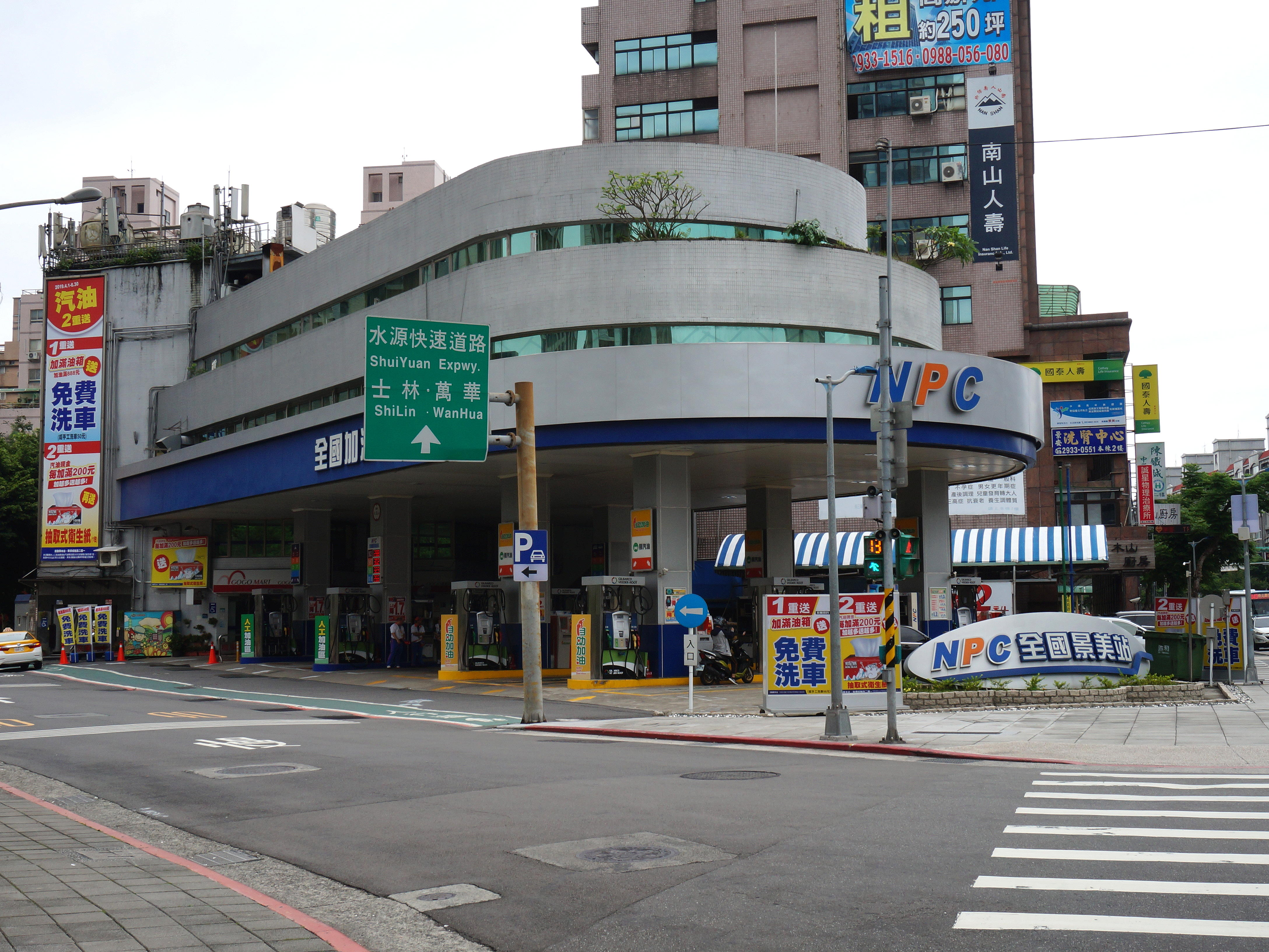 中文（台灣）: 全國加油站景美站，地址：臺北市文山區羅斯福路六段140號。4樓為全國加油站總部。